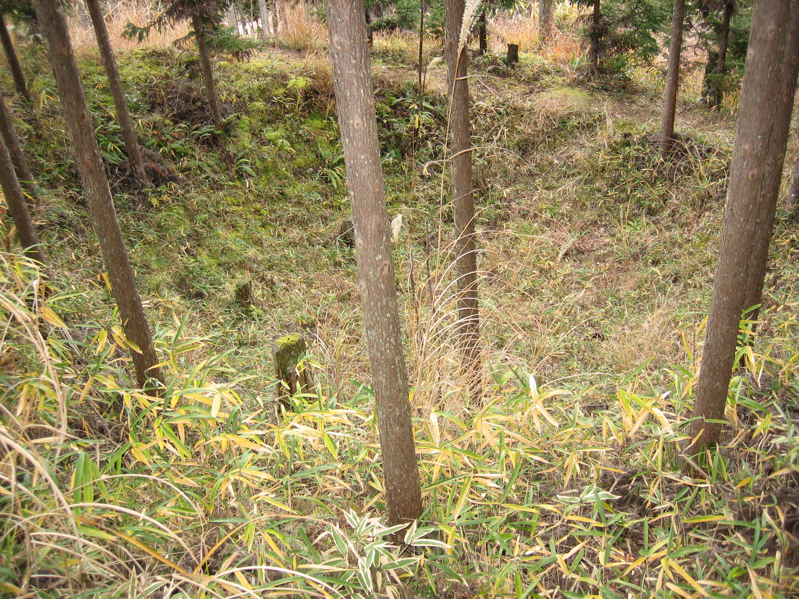 京都市北区西賀茂氷室町から氷室跡を撮影